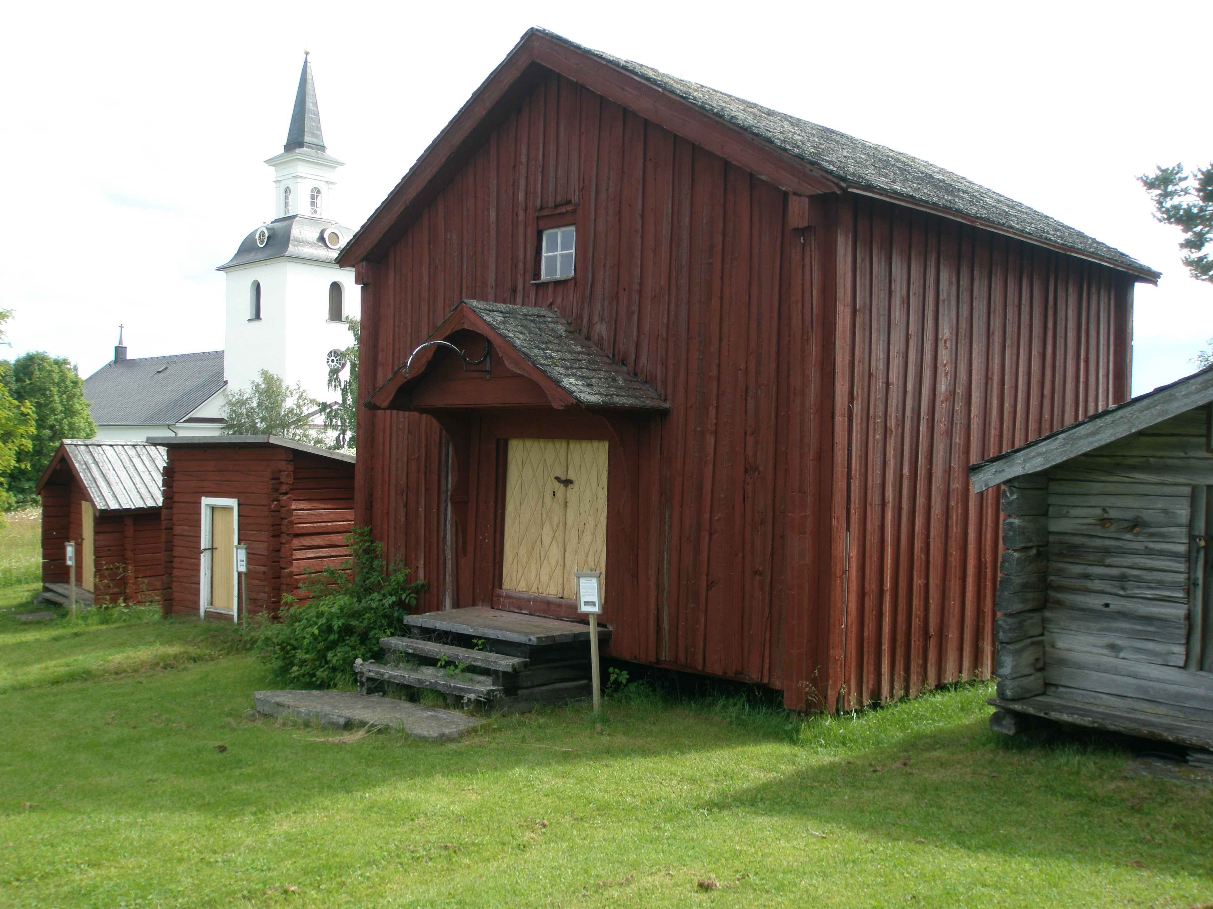 Offerdals hembygdsgård, Ede, Offerdals socken, Krokoms kommun, Jämtland, Sverige.